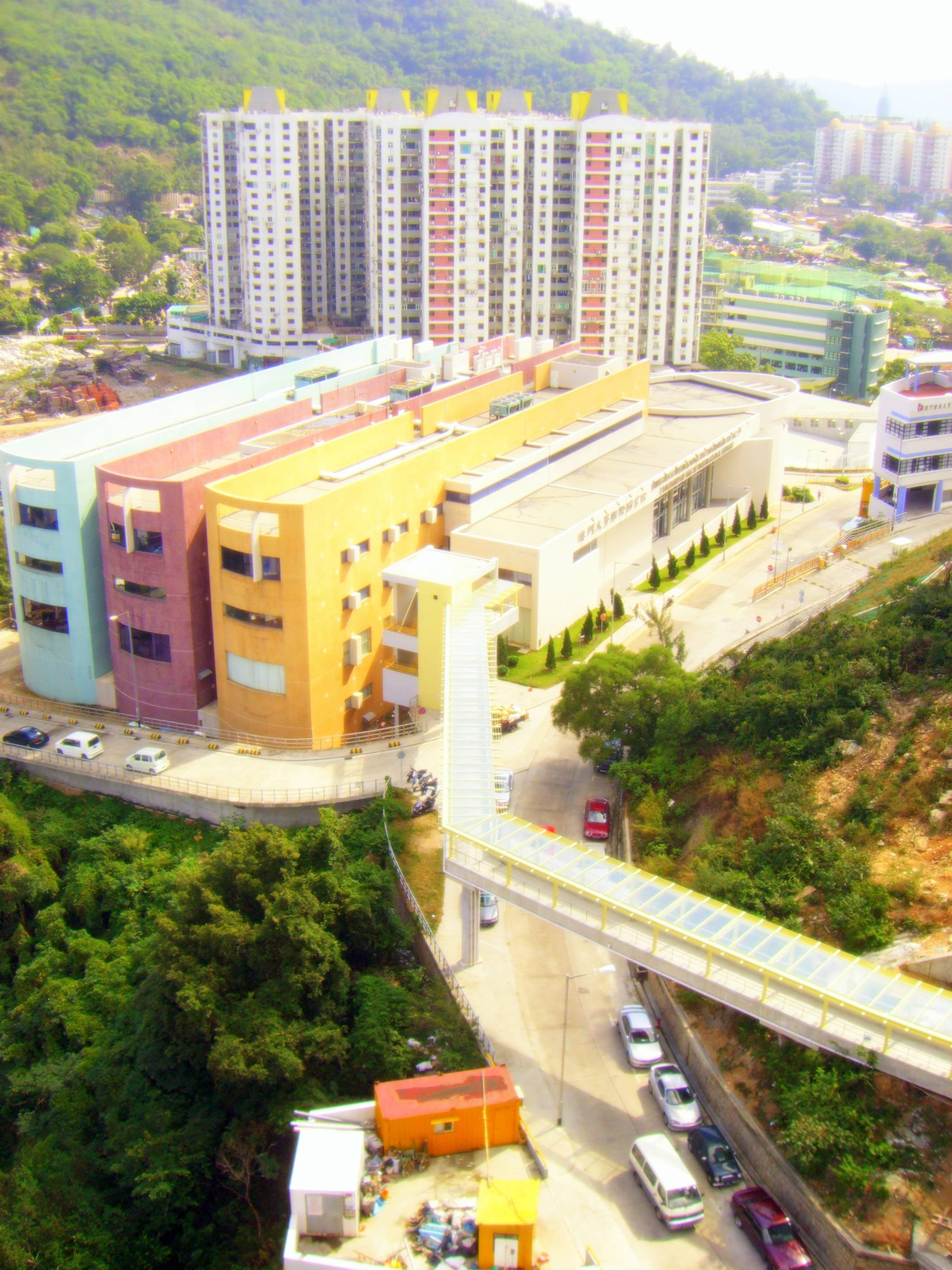 澳门大学国际图书馆